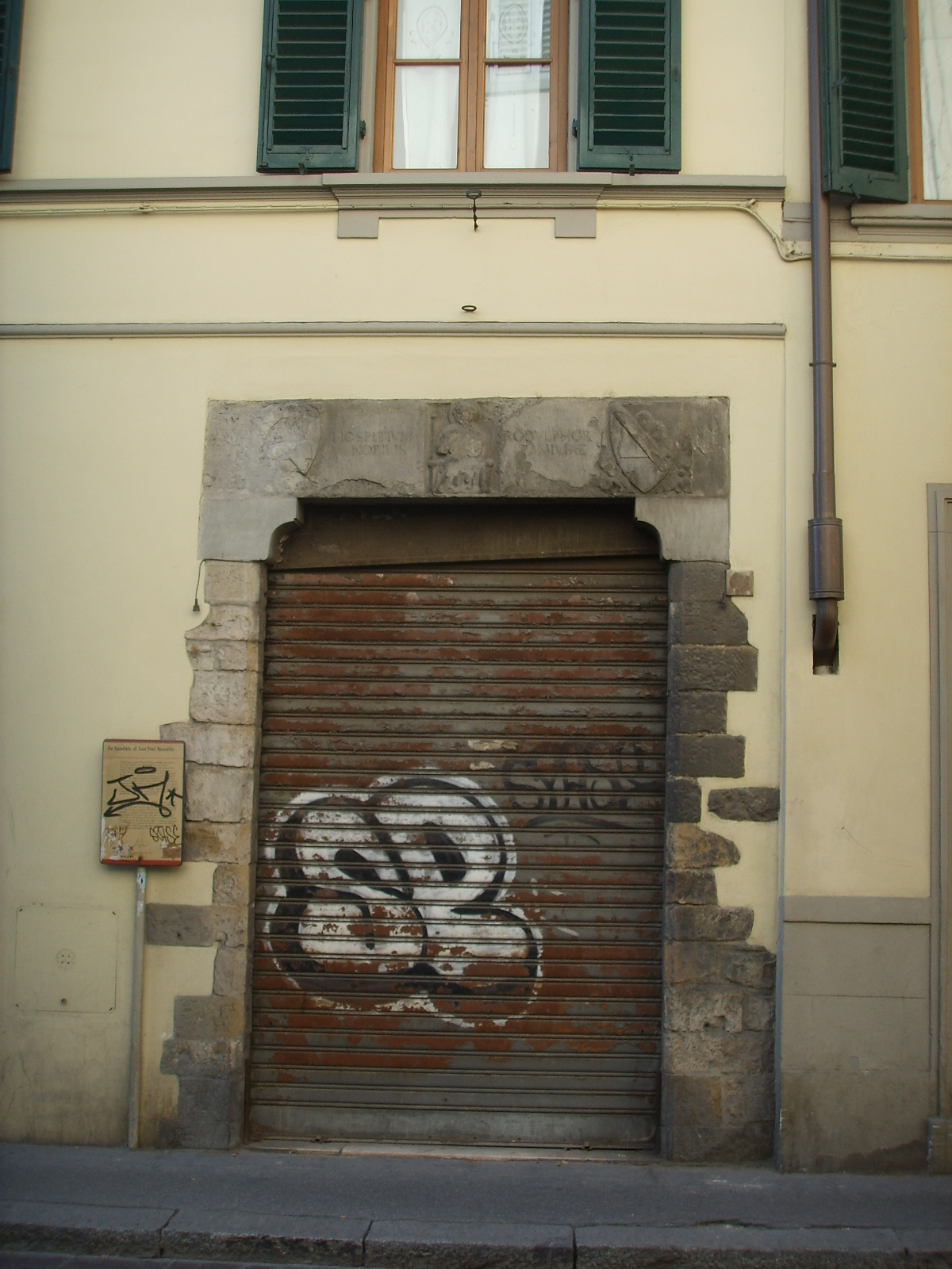 Ex spedale di san pier novello